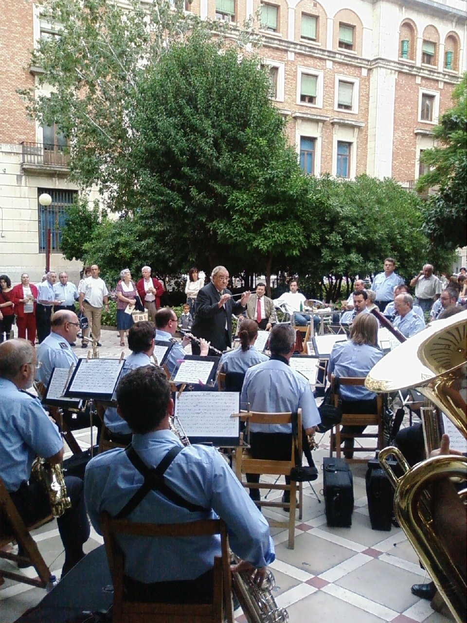 Manuel Vílchez Martínez dirigiendo la Banda Municipal de Música de Jaén, en la Plaza del Deán Mazas, junto al Palacio de los Vilches.